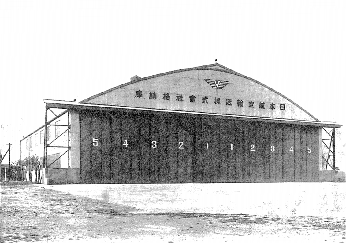 中文（台灣）: 位於台北飛行場內的飛機庫